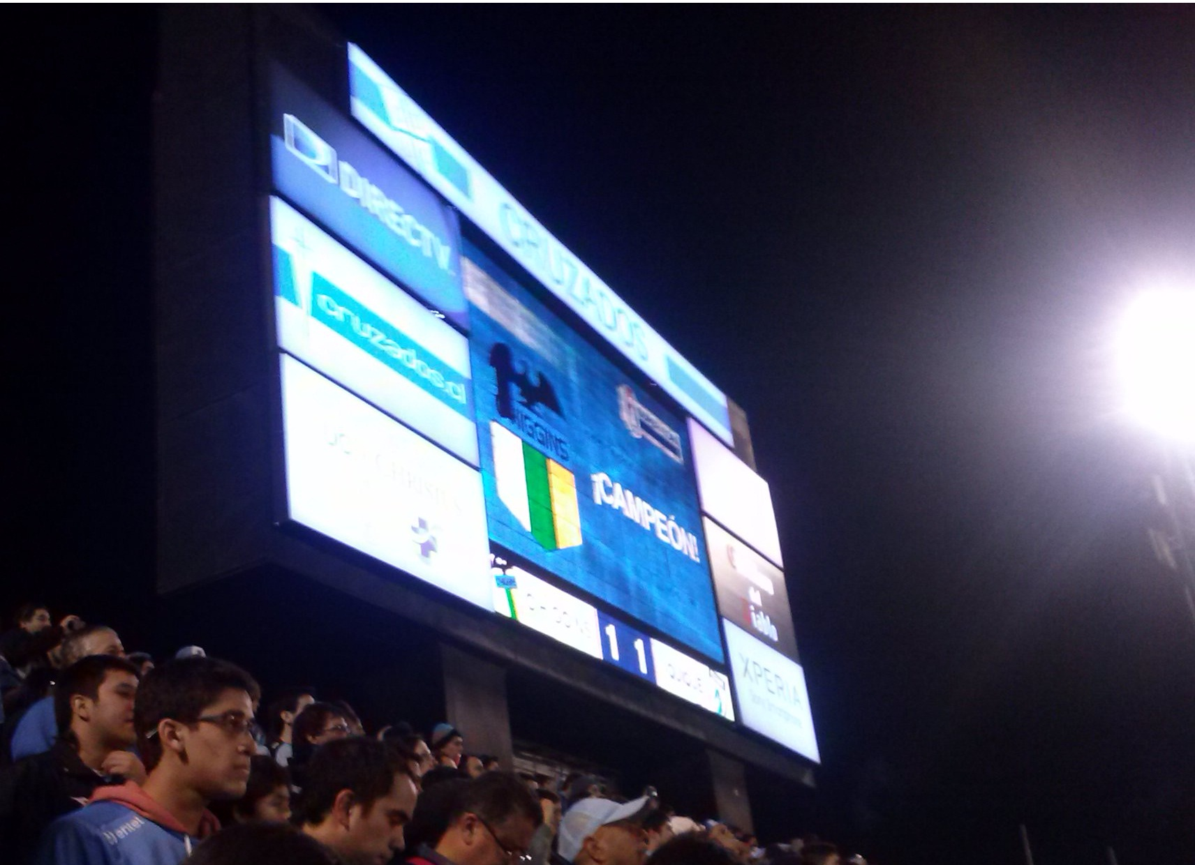 O'Higgins Campeón de la Supercopa 2014.